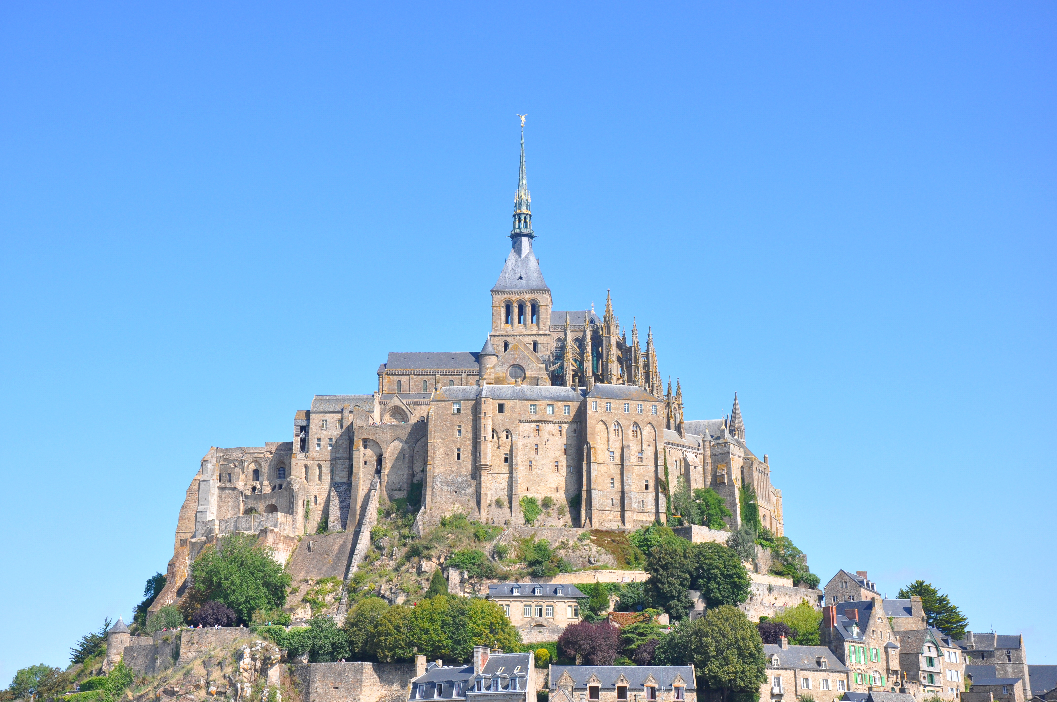 Le Mont Saint Michel - celkový pohled